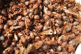 Chicatanas